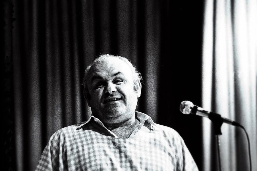 Hofi Géza (született Hoffmann[3]) (Budapest, 1936. július 2. – Budapest, 2002. április 10.) Kossuth- és kétszeres Jászai Mari-díjas magyar humorista, előadóművész, színművész, érdemes és kiváló művész, a Halhatatlanok Társulatának örökös tagja, a magyar kabaré történetének egyik leghíresebb és legtöbbet emlegetett alakja.